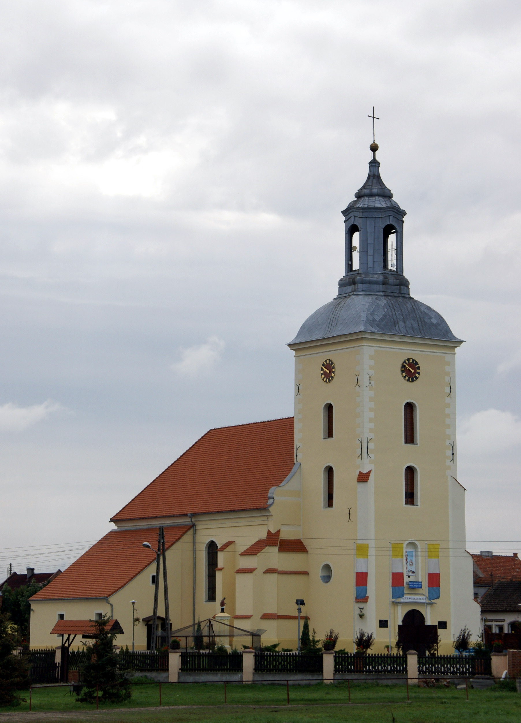 Miejska Górka, ul. Sikorskiego - rzymskokatolicki kościół parafialny pw. św. Mikołaja i św. Marii Magdaleny, 1609